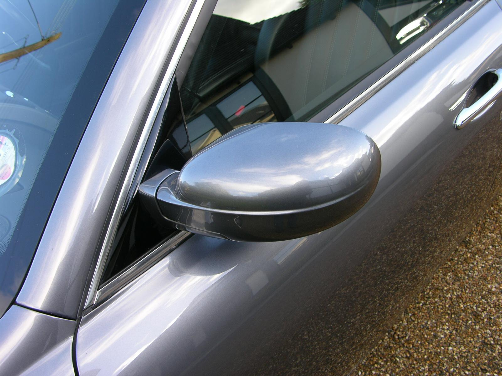 2006 Maserati Quattroporte